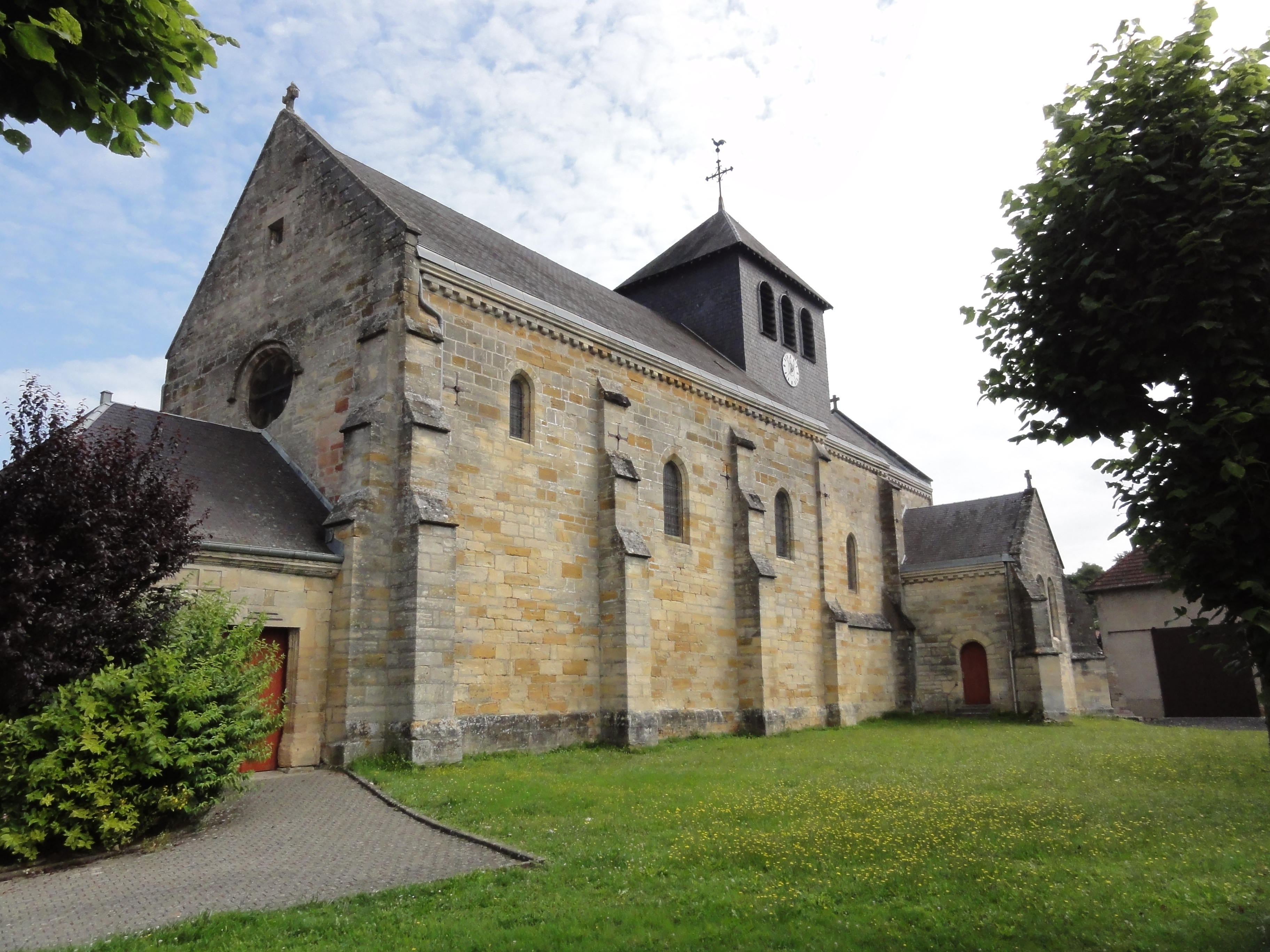 Église Saint-Martin de Beurey-sur-Saulx .